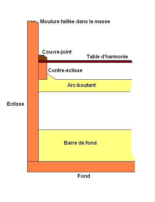 Structure interne d'un clavecin de type flamand